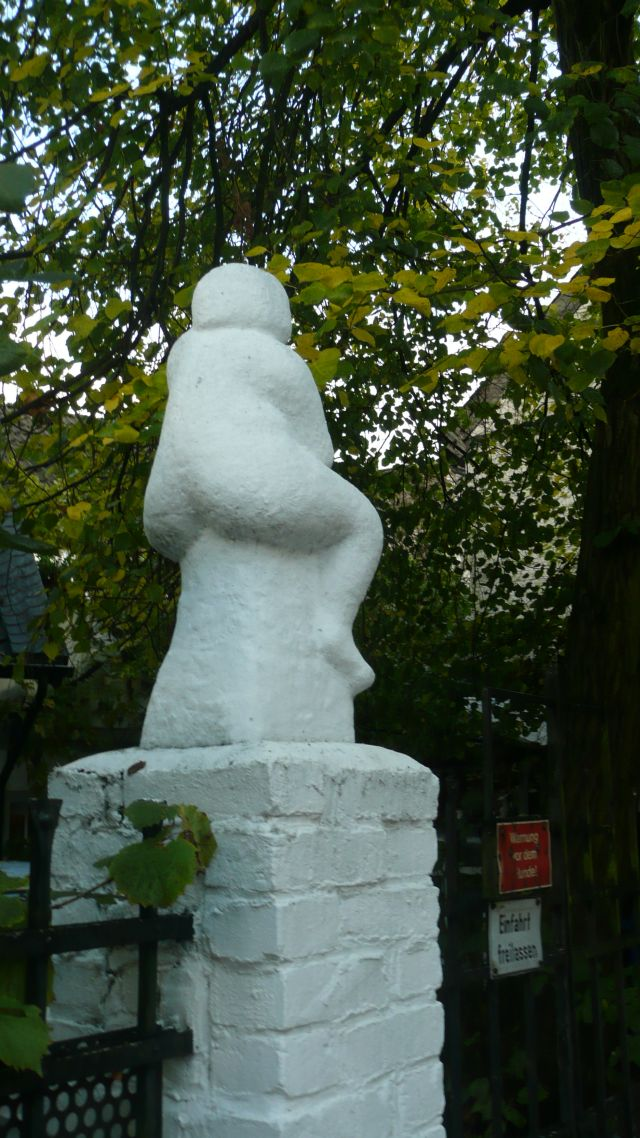 Hilden, Plastik, Sitzende mit dem schönen Po, Schwanenstraße, Wolfgang Breuers